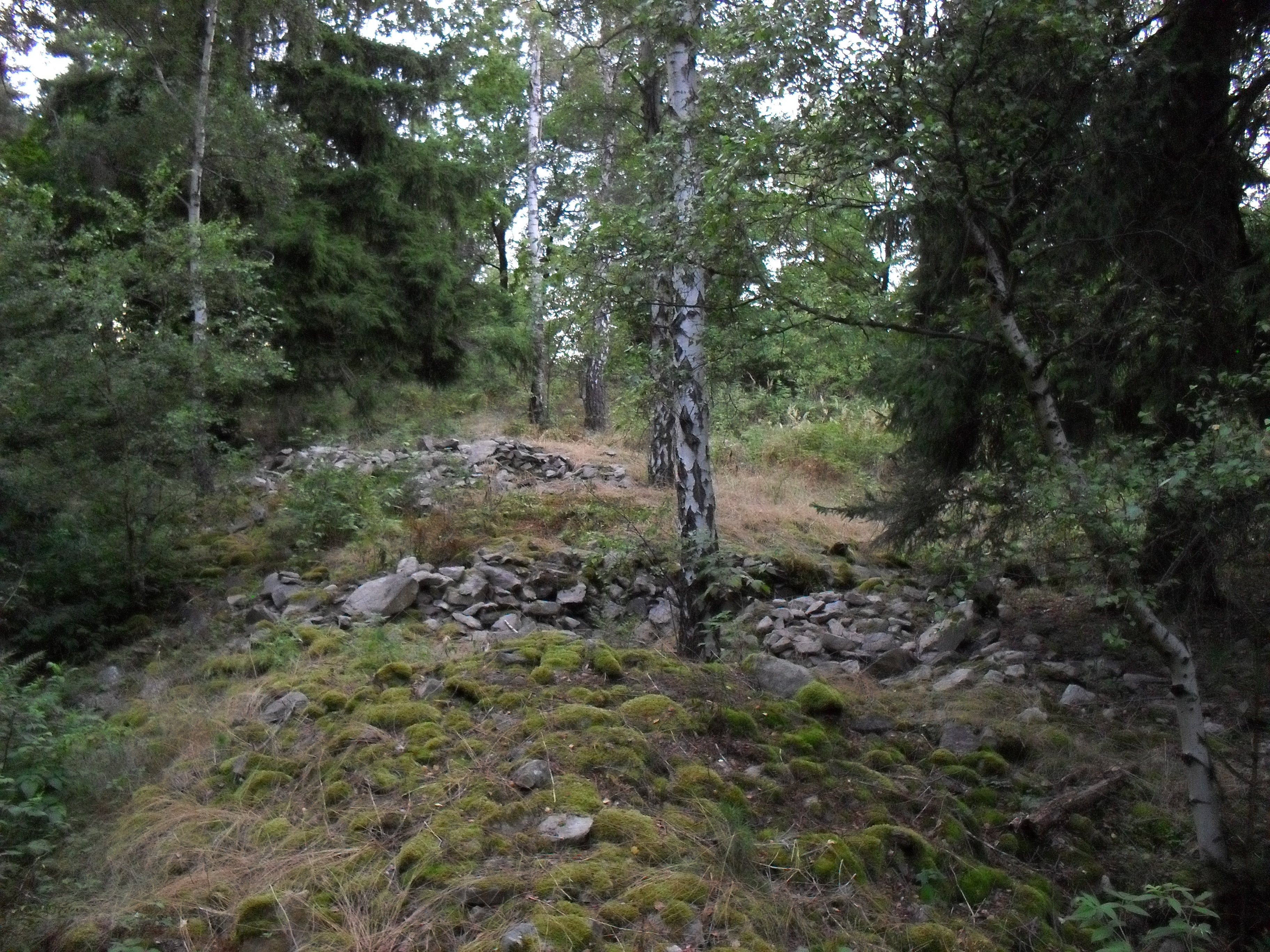 Zřícenina hradu Zvěřinec poblíž města Sedlec-Prčice.